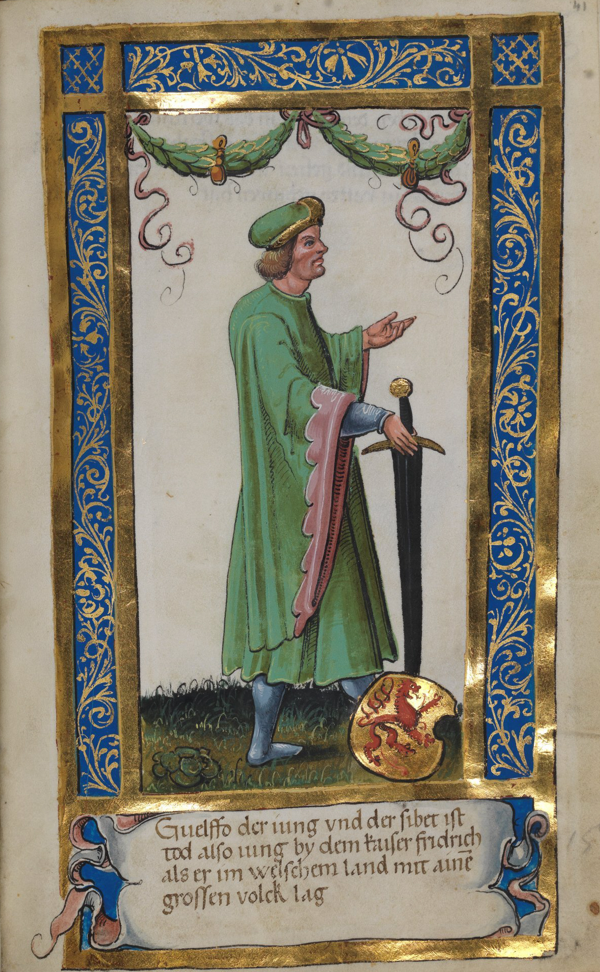 Weingartener Stifterbüchlein, Württembergische Landesbibliothek Stuttgart, Cod.hist.qt.584, fol. 41r, Stifterbild Welf VII. Guelffo der iung vnd der sibet ist tod also iung by dem kaiser fridrich als er im welchen land mit aine[m] grossen volck lag